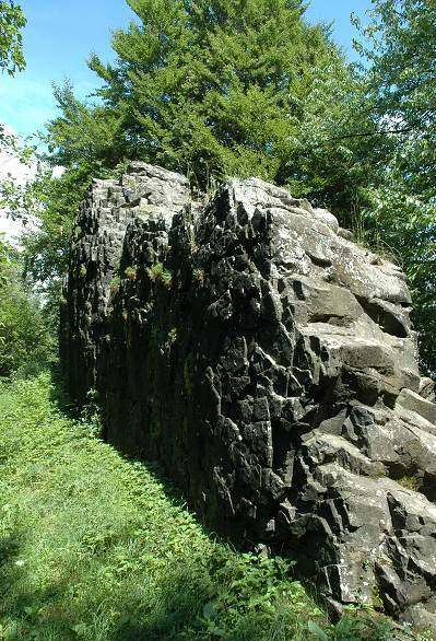 Čertův stolec - část čedičové zdi vystupující na povrch.